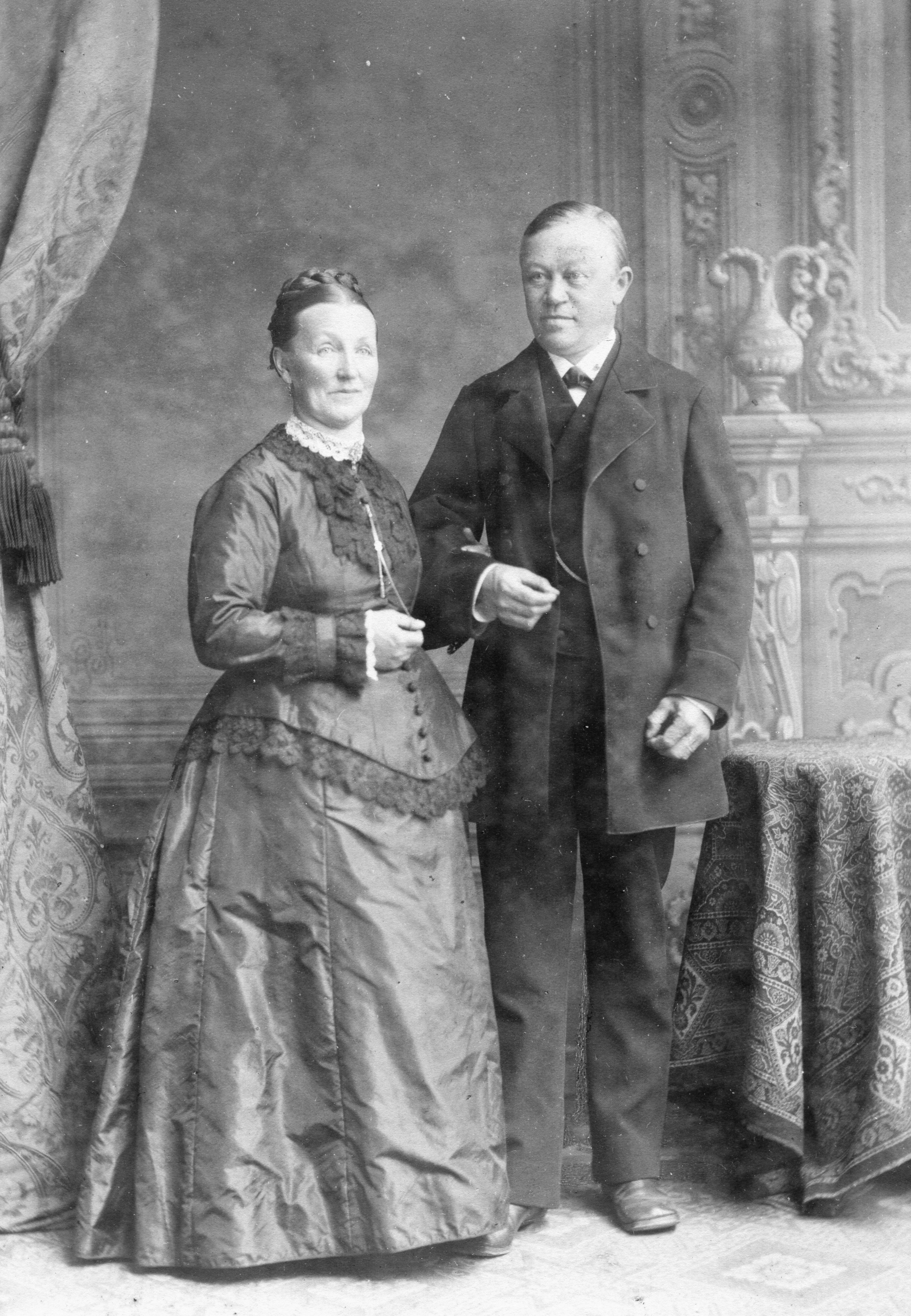 Professor Max Heilmaier mit Mutter Viktoria